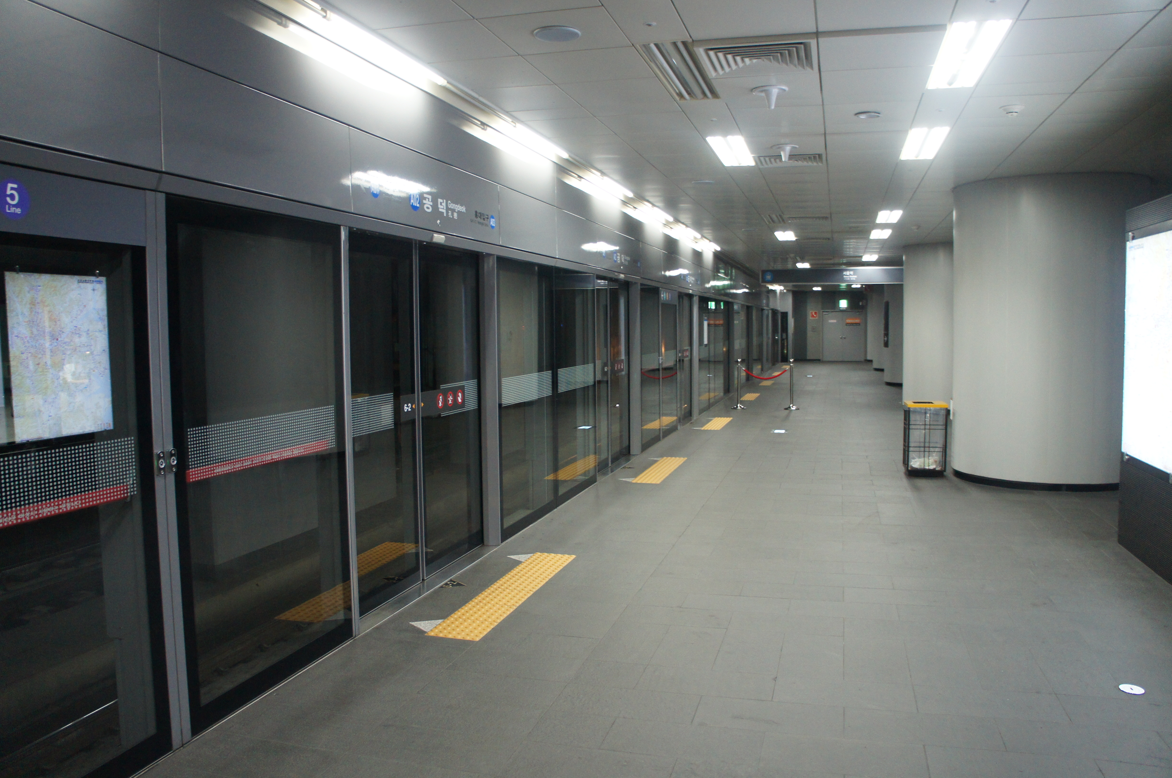 공덕역 공항철도 승강장